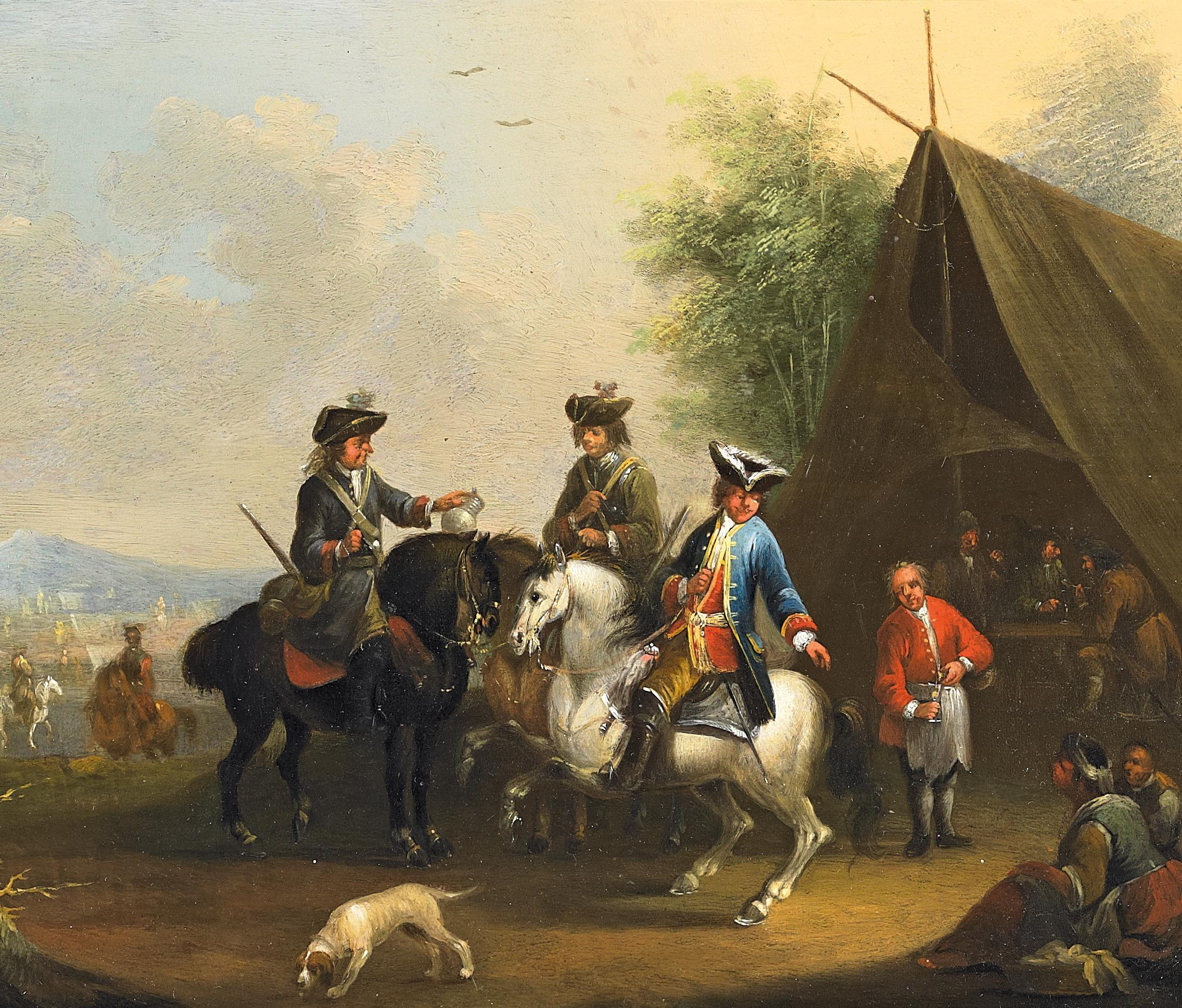 Ludwig IX. mit Soldaten am Zeltlager.